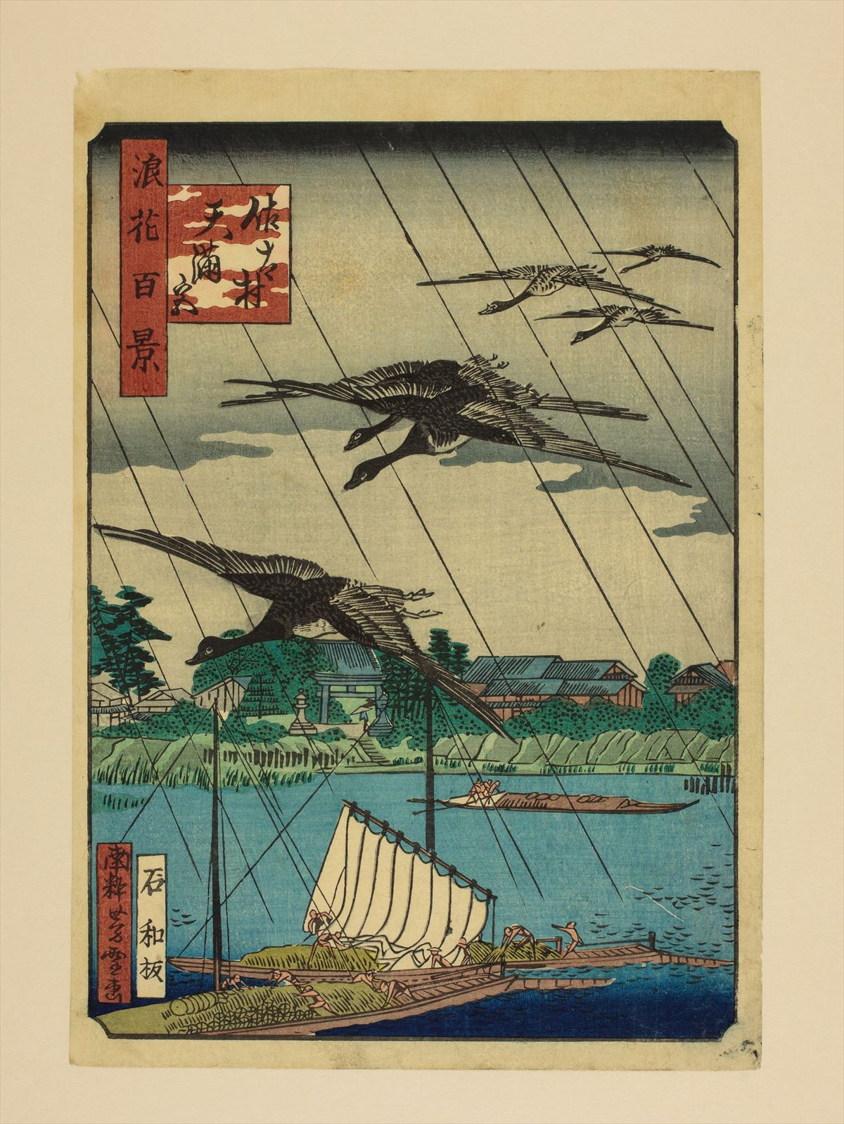 1800年代。南粋亭芳雪/画 。浪花百景 102枚のうちの1枚。大阪市立中央図書館蔵。